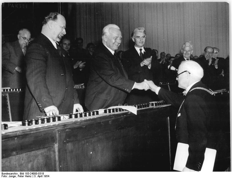 Zentralbild-Junge Hlg-fr 3.4.1954 IV. Parteitag der Sozialitsischen Einheitspartei Deutschlands, Berlin, Werner-Seelenbinderhalle Am 3.4.1954 überbrachte eine Wissenschaftler-Delegation dem IV. Parteitag der SED die Grüße der Wissenschaftler der Deutschen Demokratischen Republik. UBz: Der Präsident der Akadmie der Wissenschaften Prof. Dr. Friedrich begrüßt den Vorsitzenden der Sozialistischen Einheitspartei Deutschlands Wilhelm Pieck. Links der 1. Sekretär des Zentralkomitees der SED Walter Ulbricht. Stammabzug darf nicht aus dem Hause